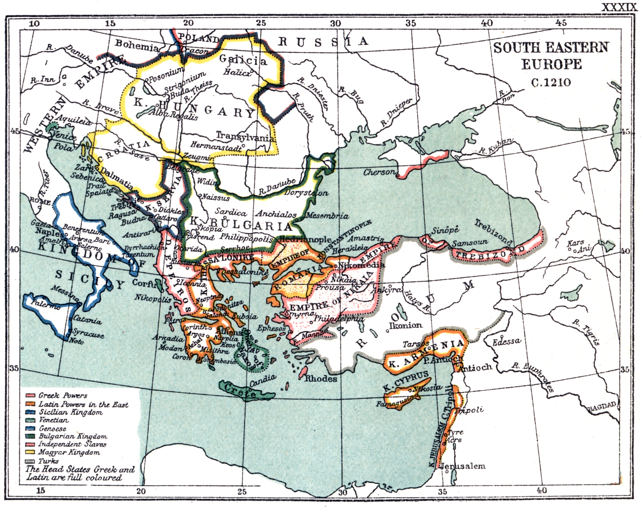 XXXV SE Europe c. 1210